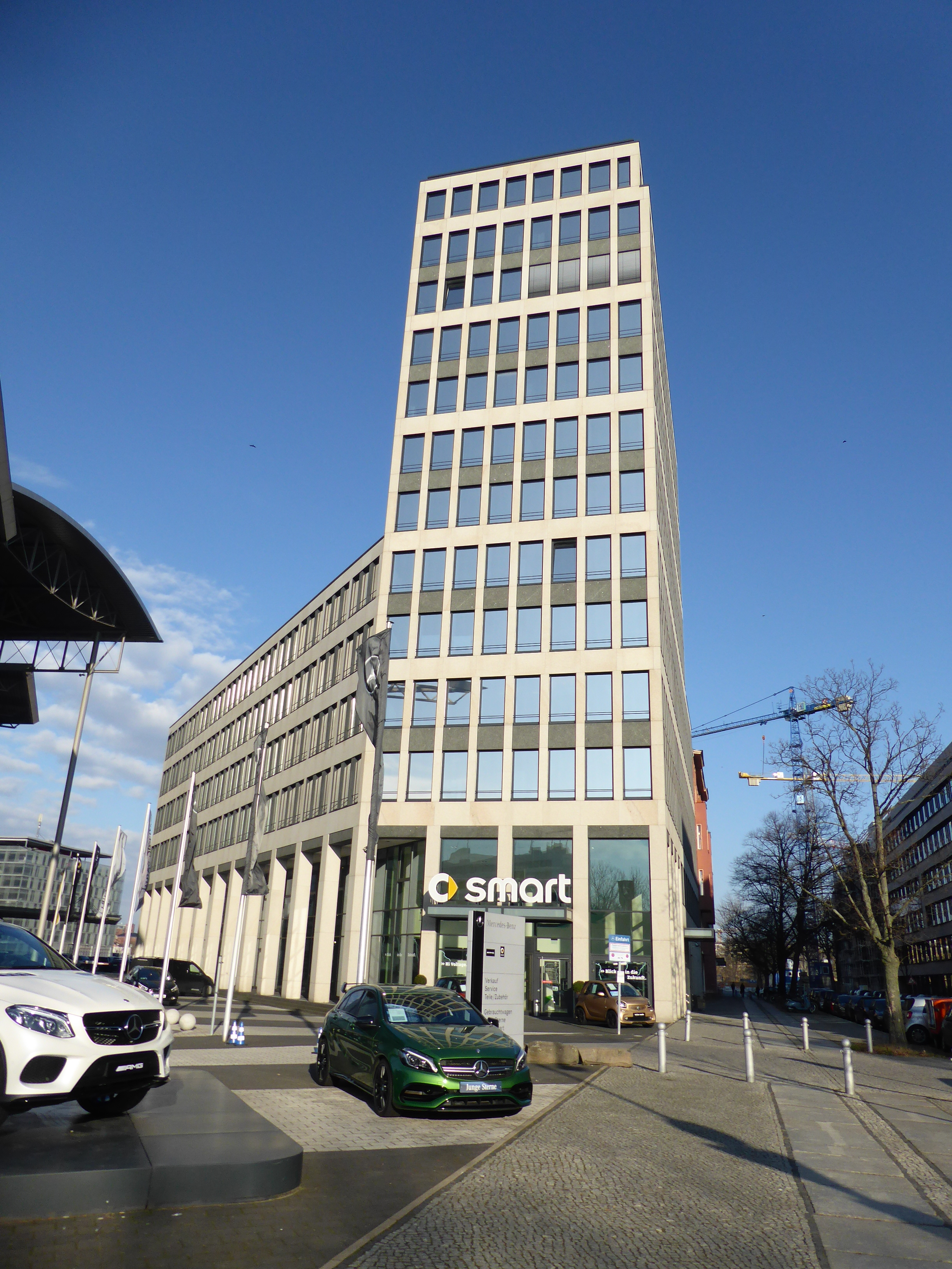 Charlottenburg Englische Straße Smart-Center